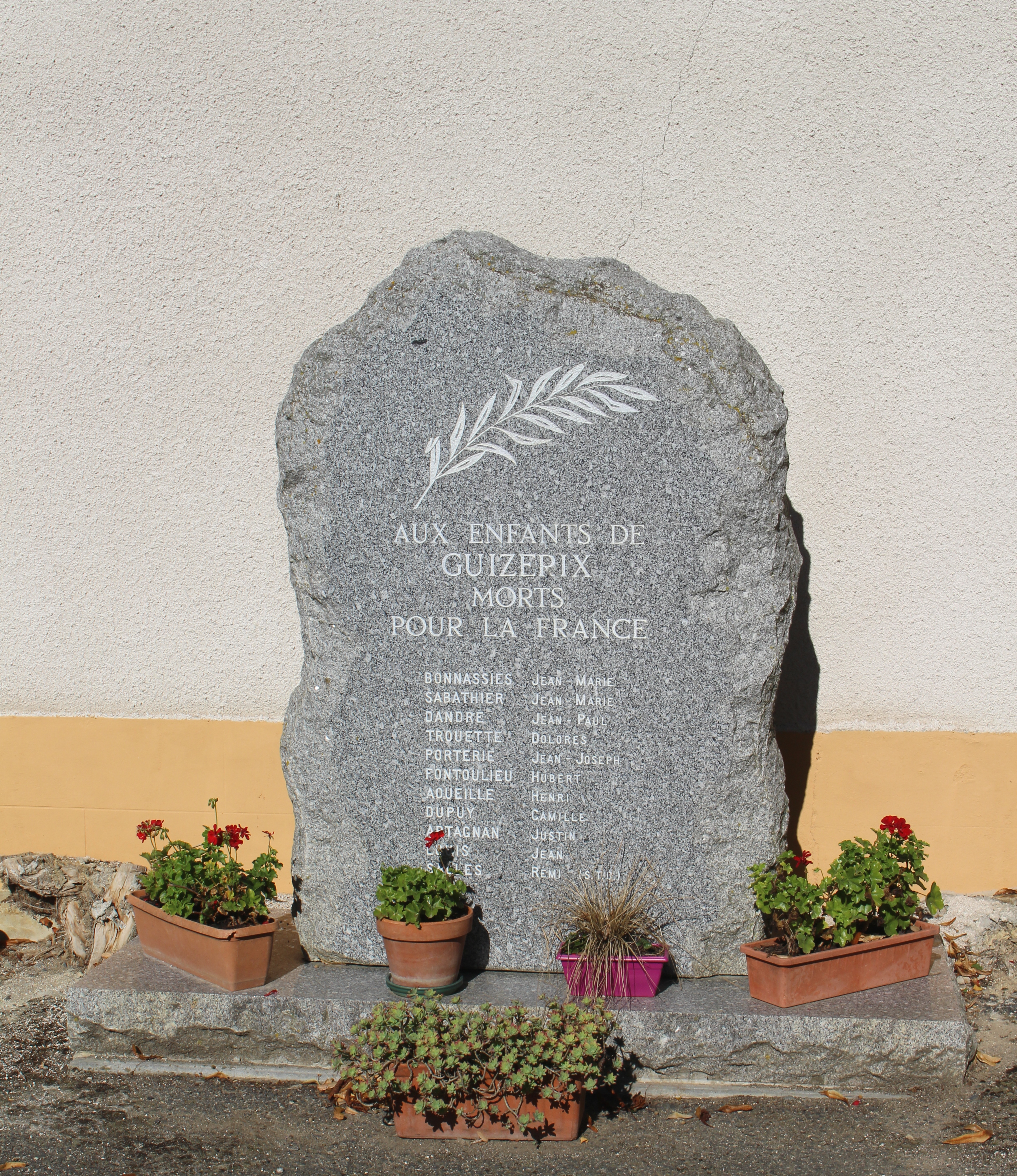 Monument aux morts de Guizerix (Hautes-Pyrénées)